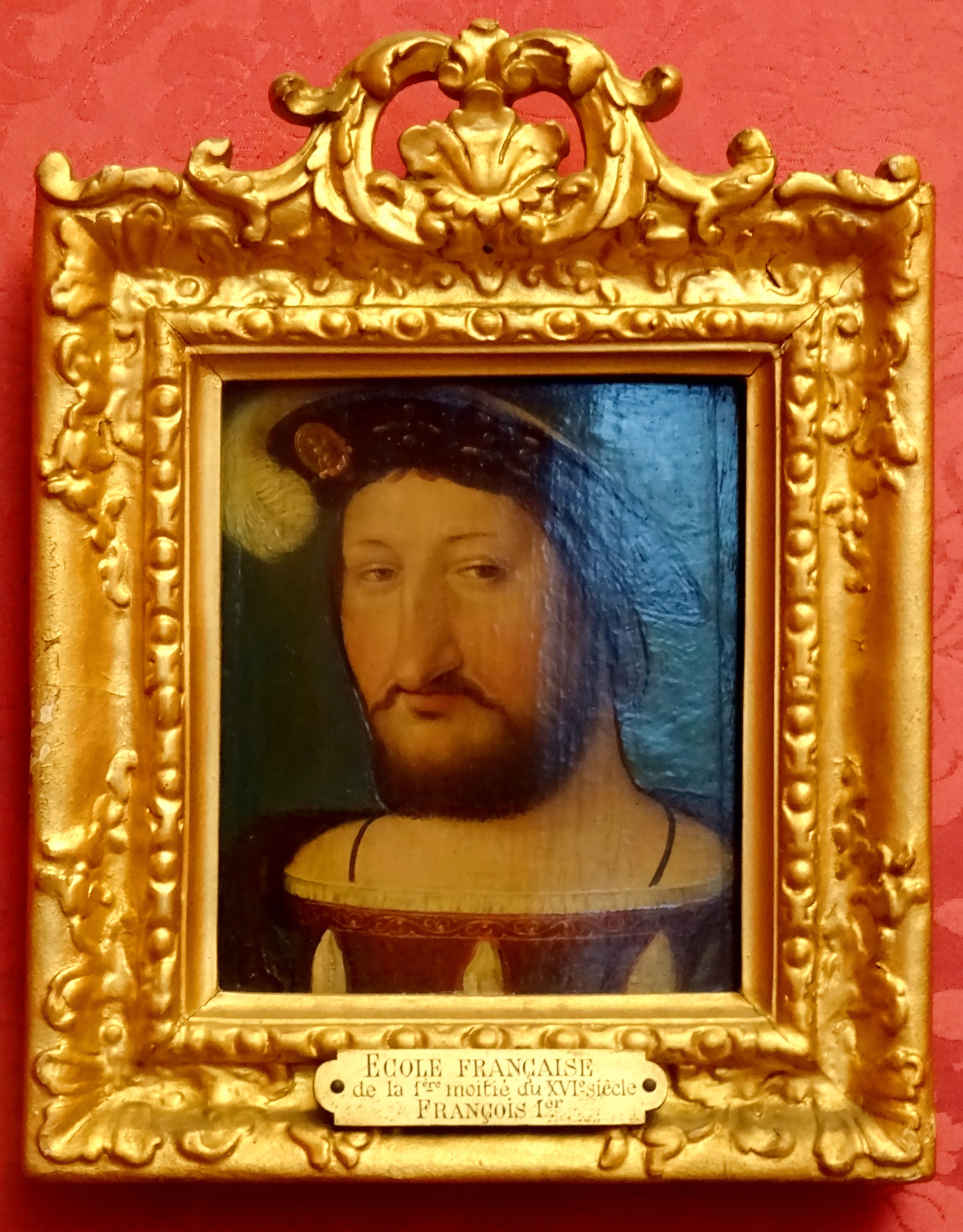 Musée Condé, anonyme, portrait de François Ier, vers 1535, inv. PE 243.